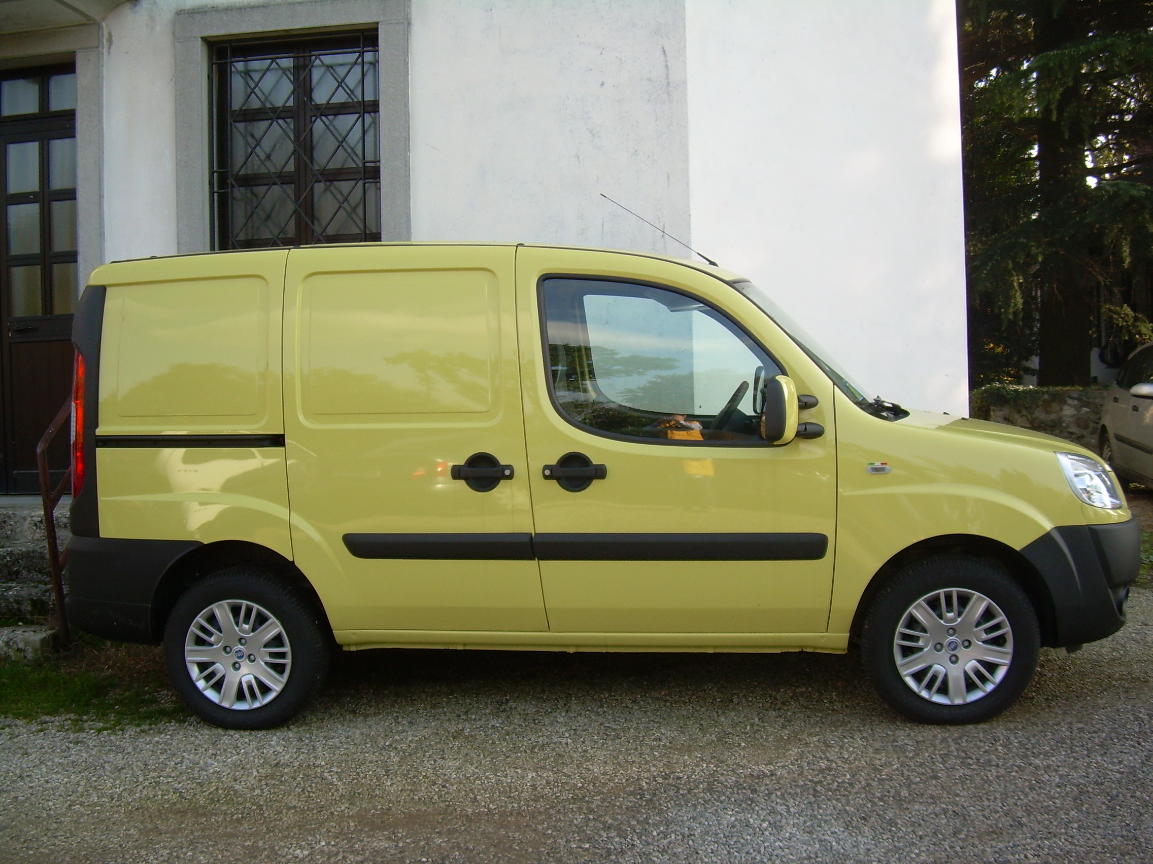 Fiat Doblò facelift 2006.